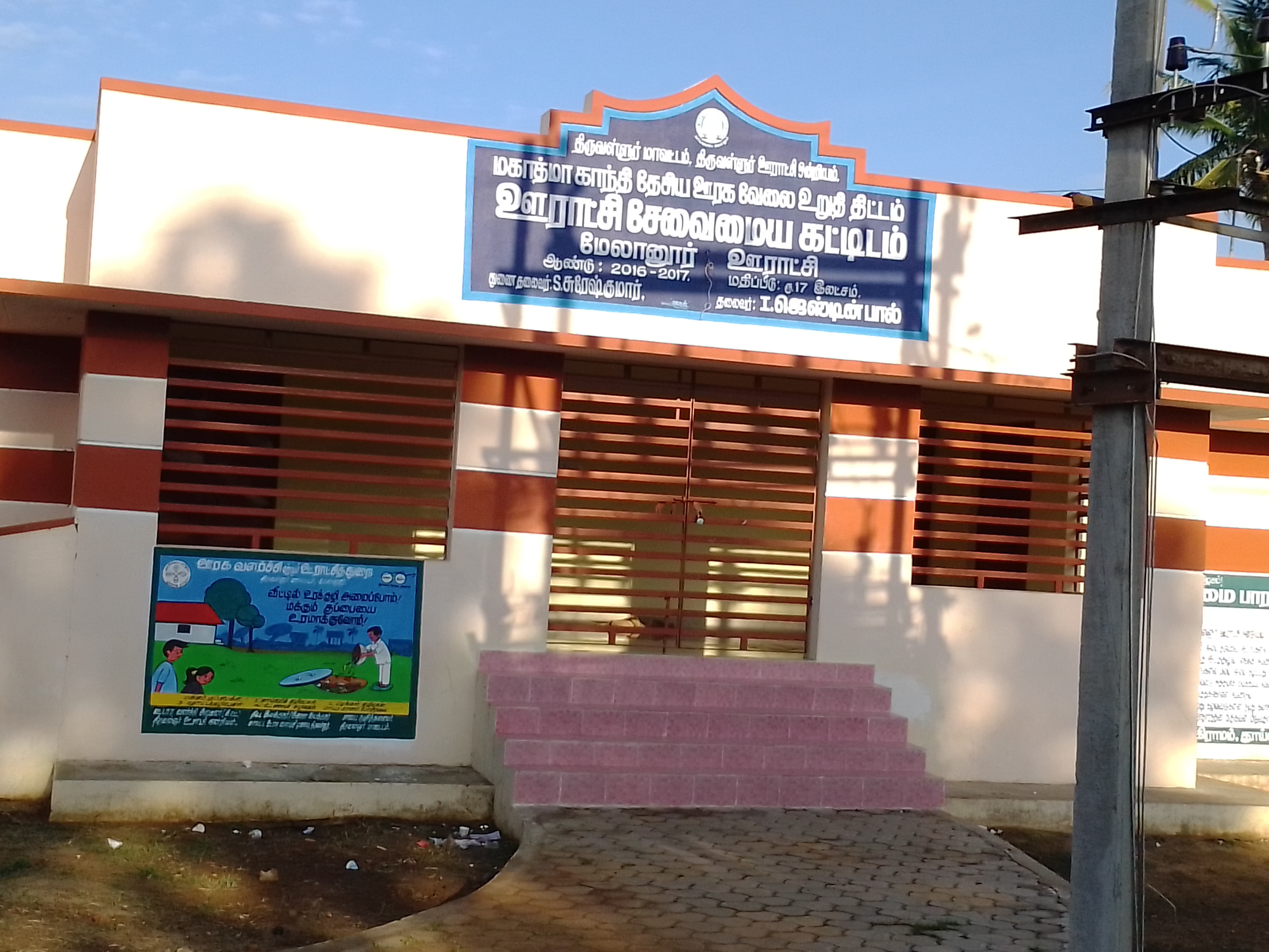 மேலானூர் ஊராட்சி சேவைமைய கட்டிடம்